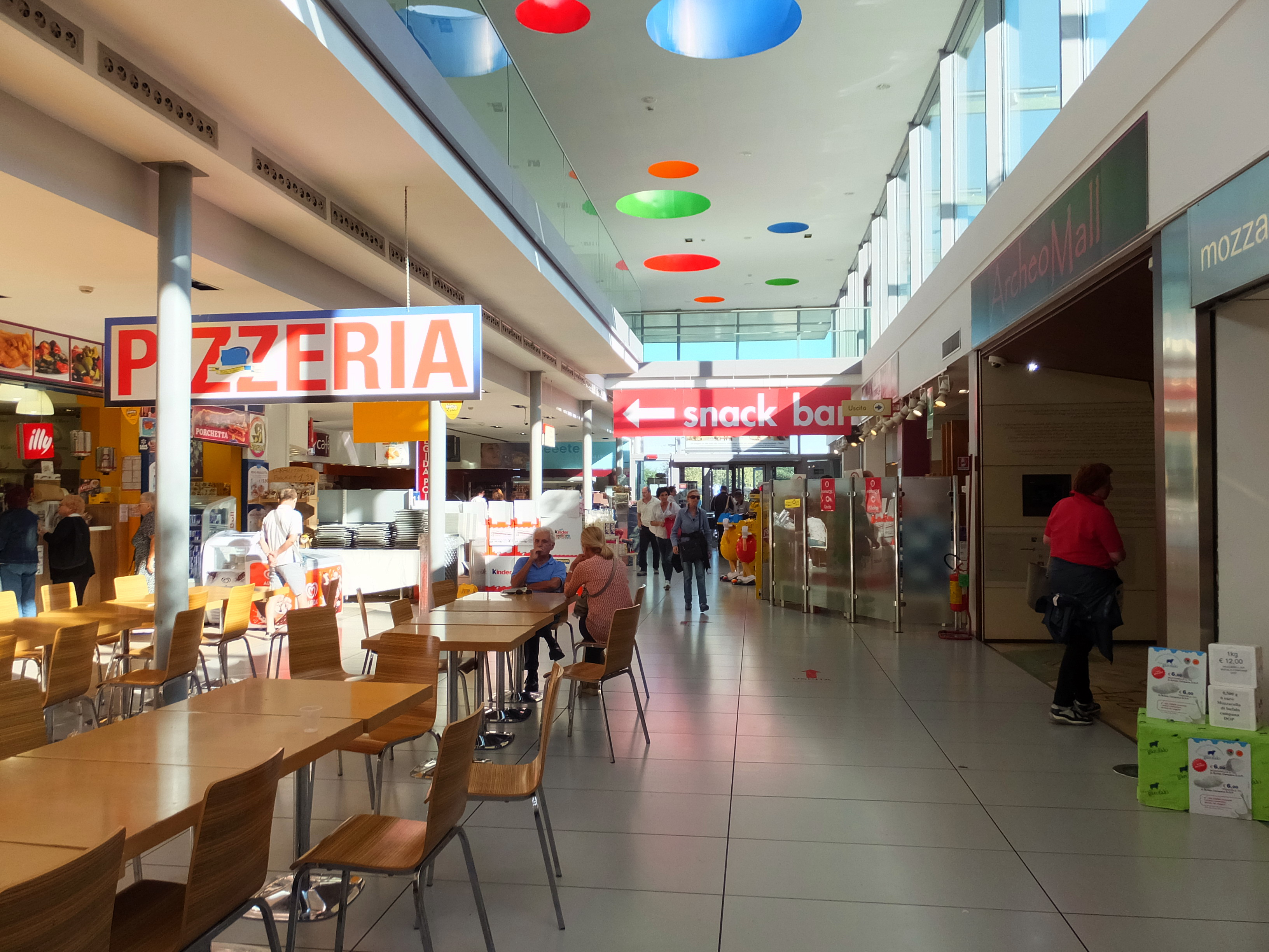 Autogrill Casilina Est 卡西里納服務區